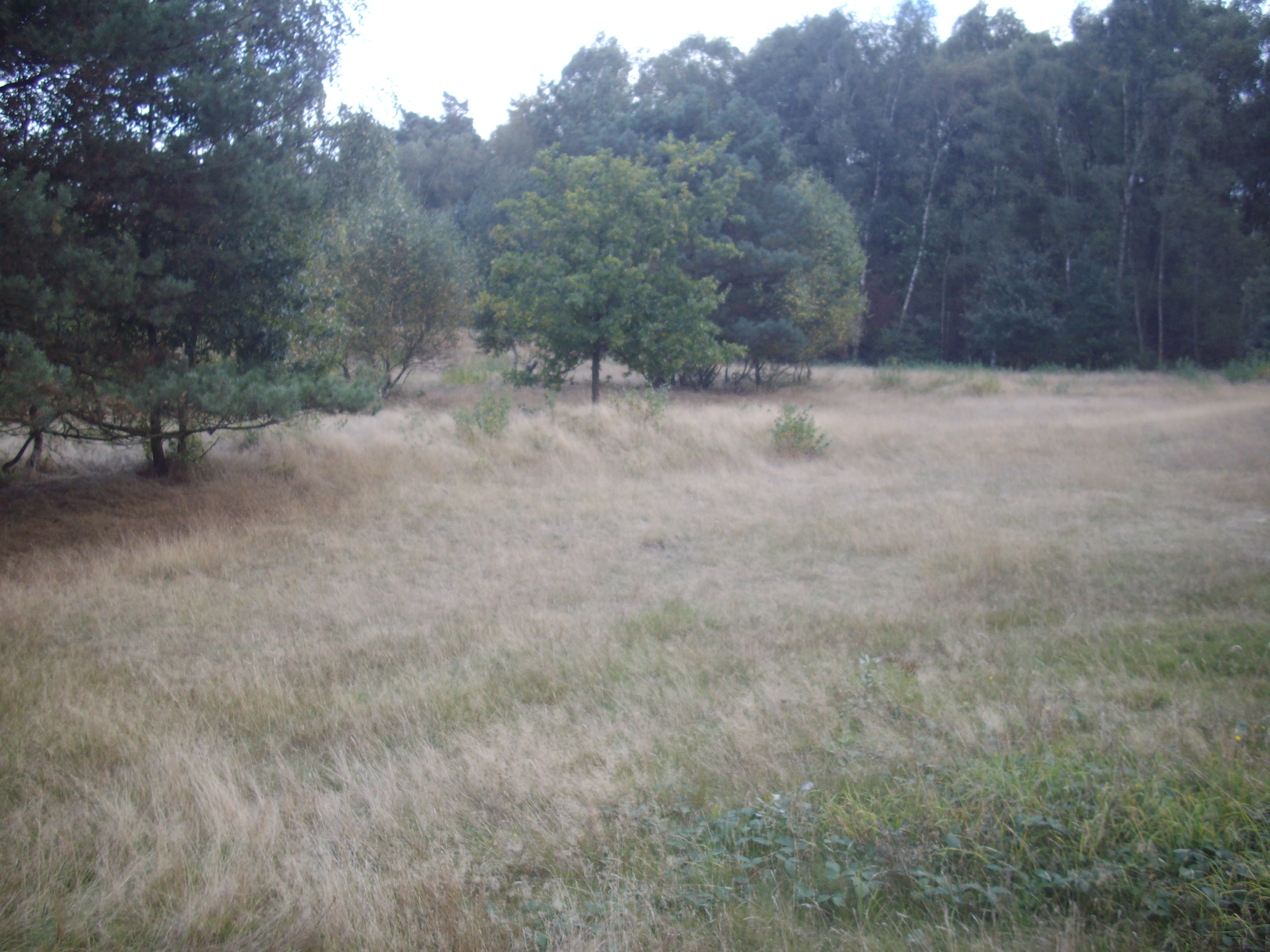 Heidelandschaft im Bereich Aaper Vennekes im Naturschutzgebiet „Drevenacker Dünen“ bei Wesel-Wittenberg